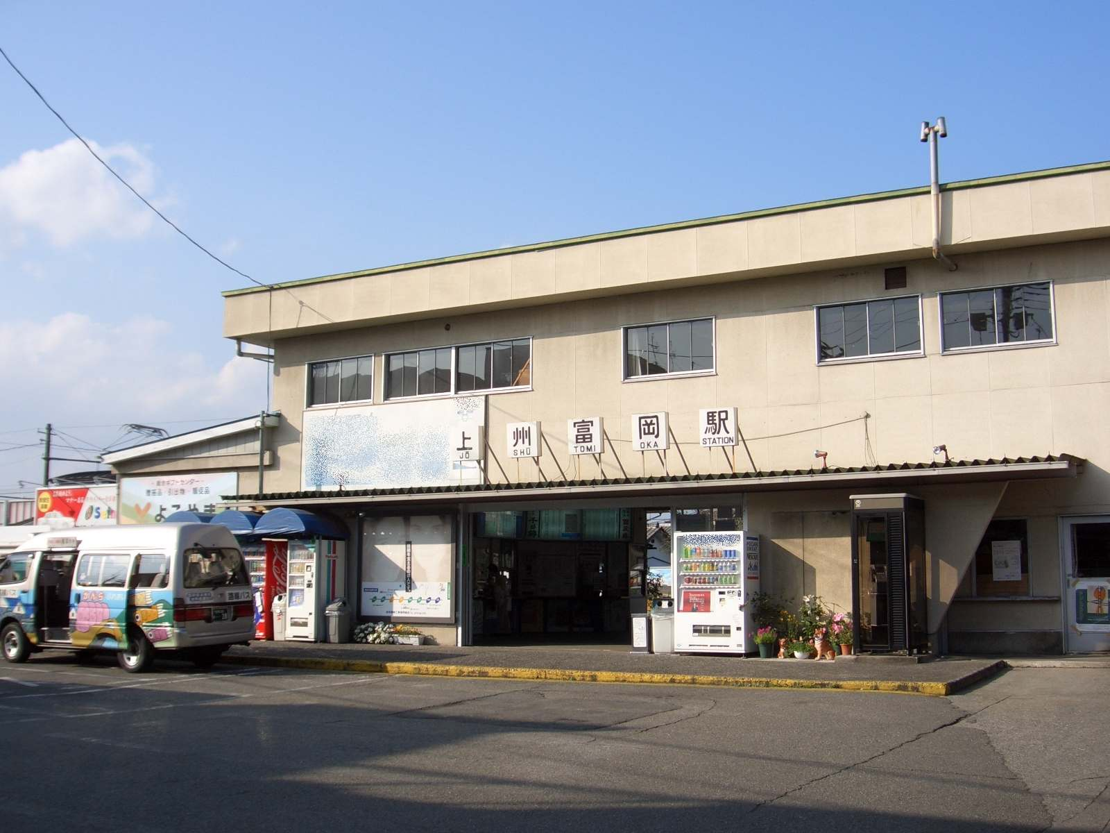 2代目上州富岡駅 建替に伴い2013年2月に解体される